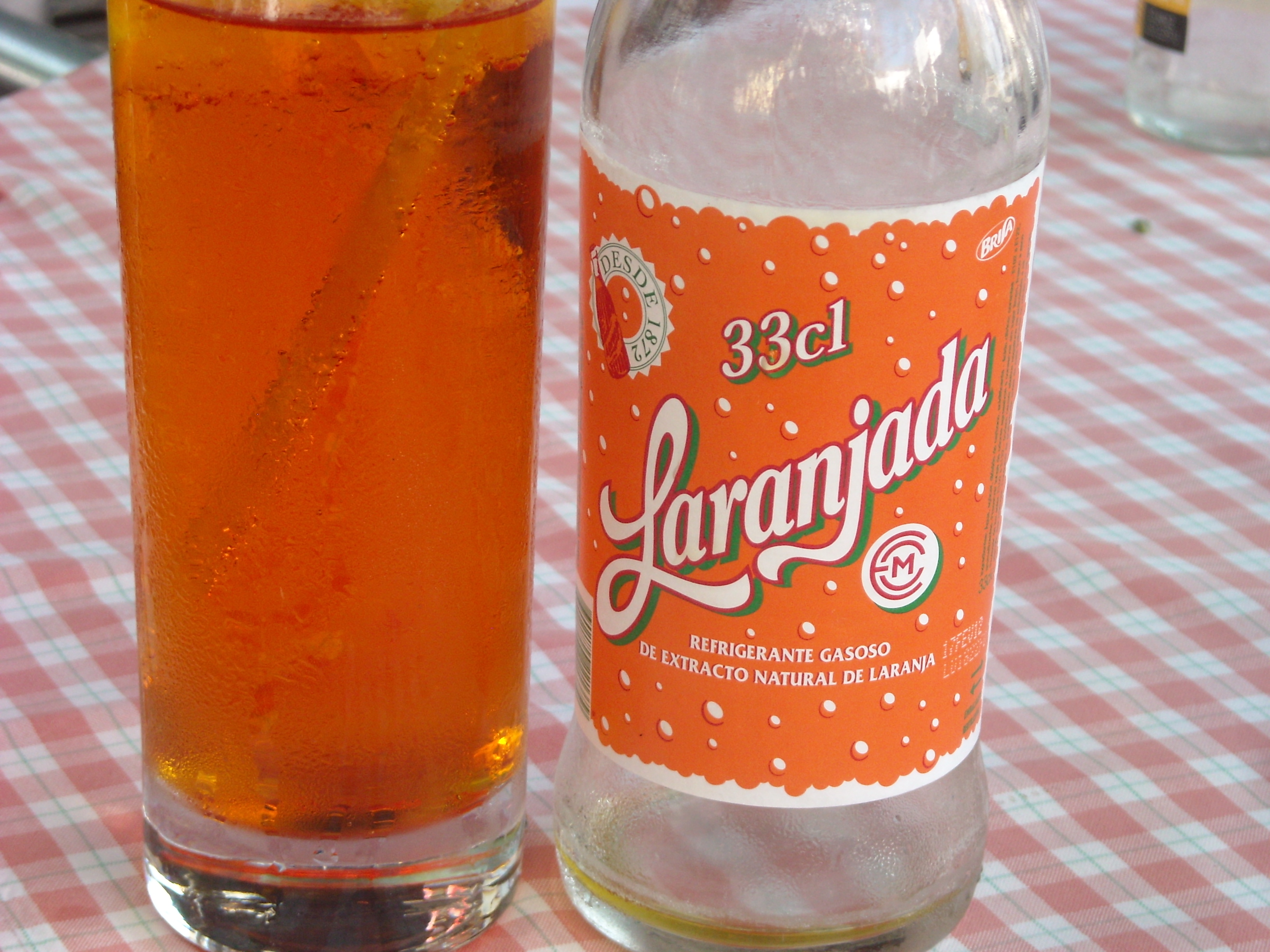 Aragonés: Laranjada, Funchal, Madeira